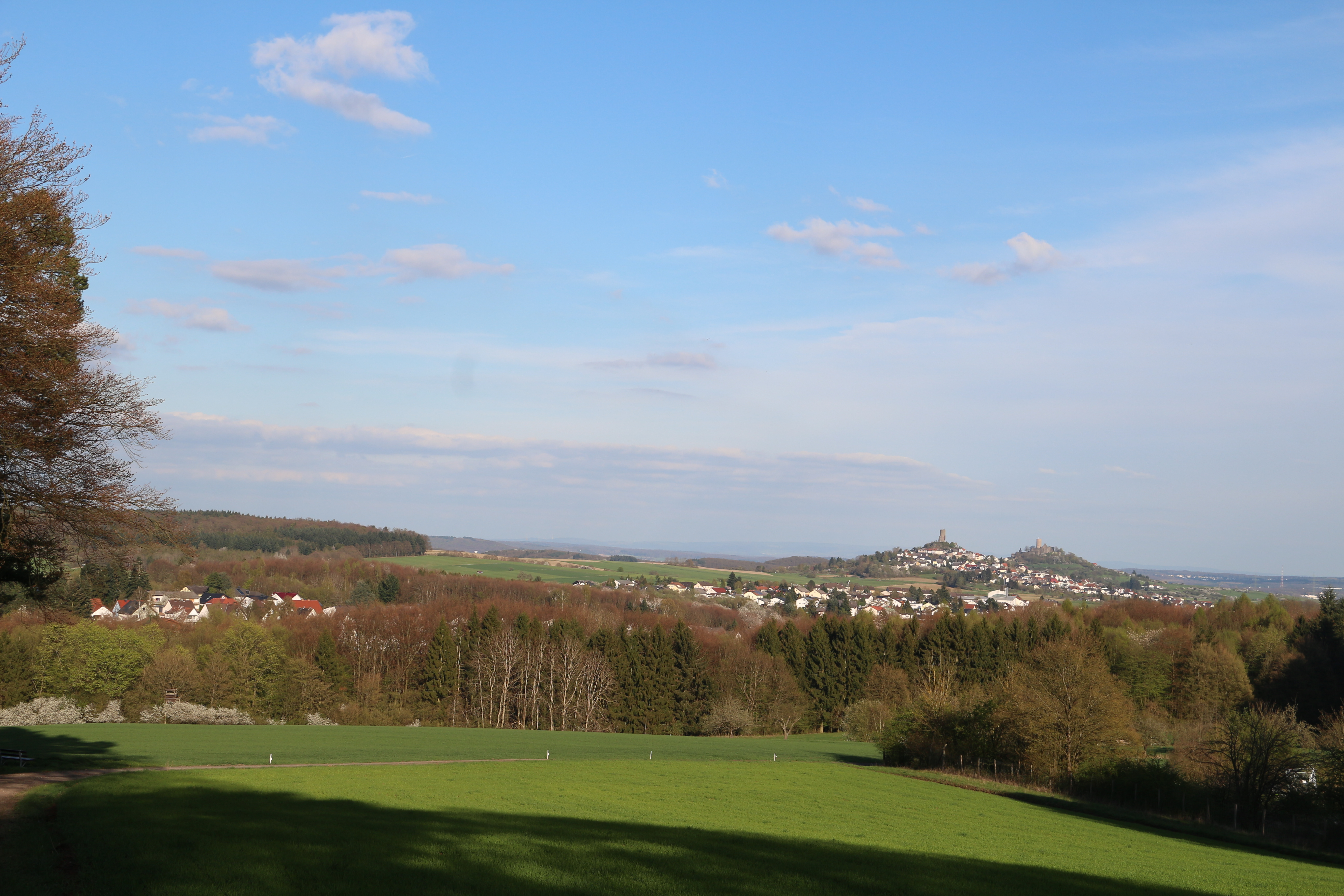 Links Vetzberg, rechte Gleiberg; Ansicht westl. Rodheim-Bieber